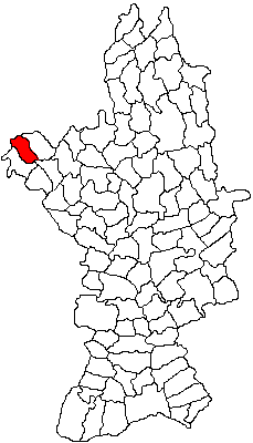 Categorie:Hărţi ale judeţului Olt